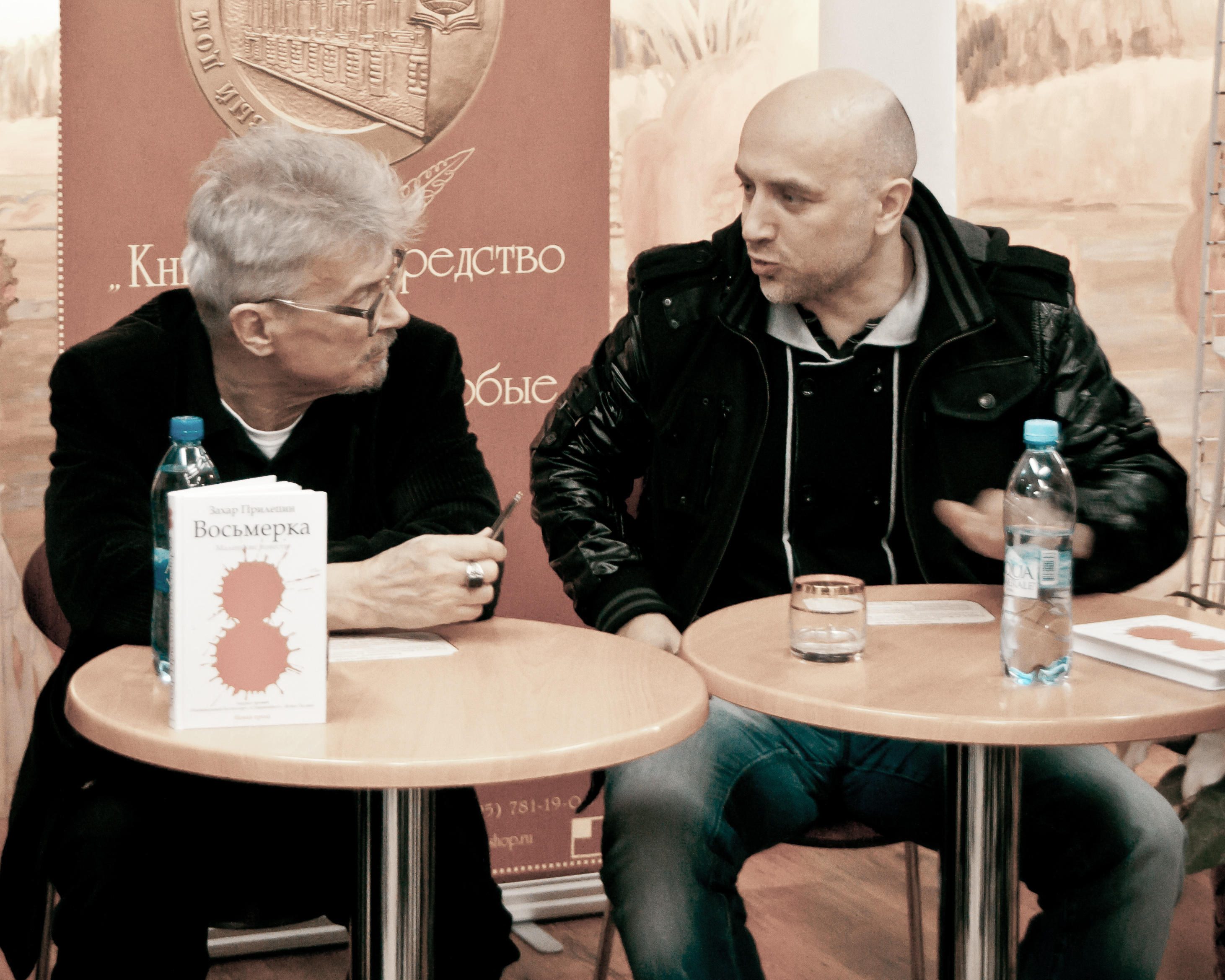 Эдуард Лимонов и Захар Прилепин на презентации сборника ""Лимонка" в тюрьму" и других книг этих авторов